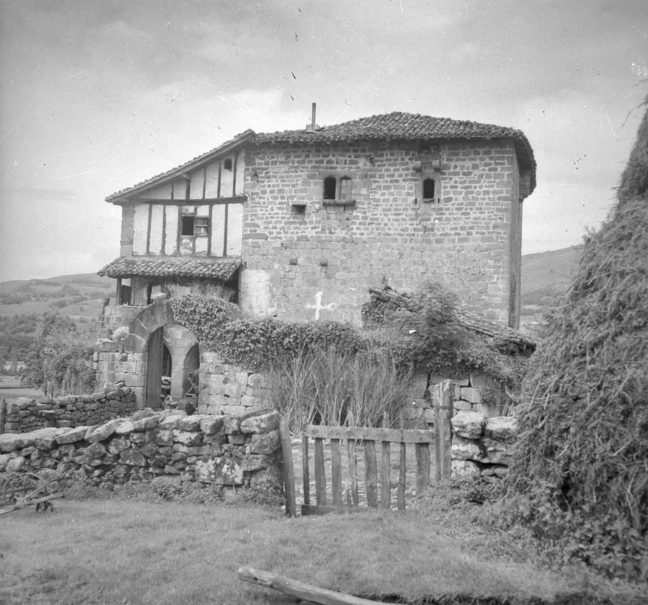 Arizkungo Urtsua jauregia, Baztan.